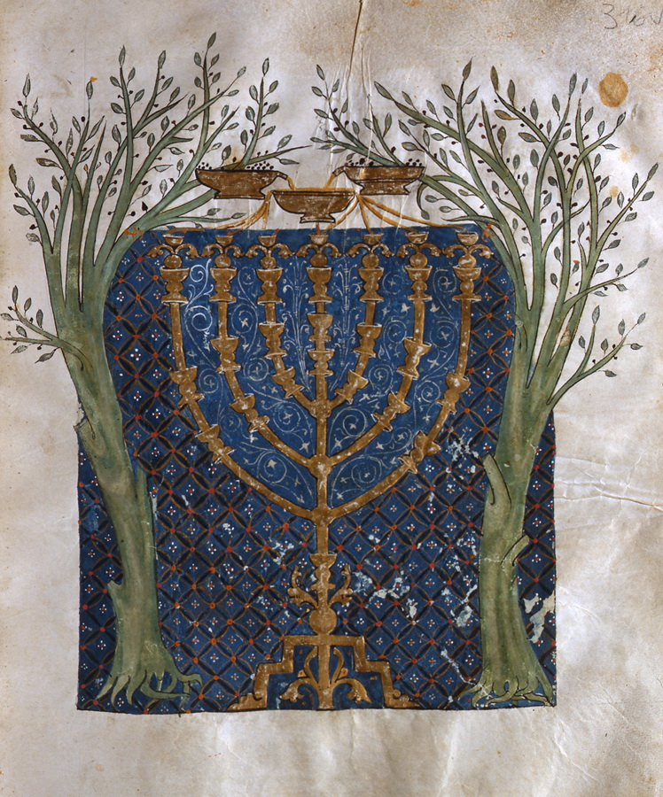 Bíblia de Cervera, Menorá de Zacarias (fl 316v)